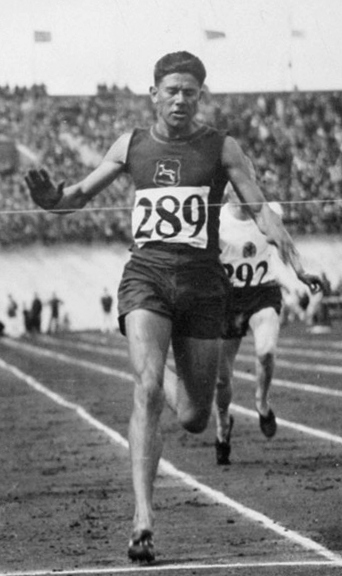 Olympische Spelen 1928 Amsterdam, Nederland : Finish van de achtste serie van de 100 meter hardlopen. De Zuidafrikaan Viljoen.